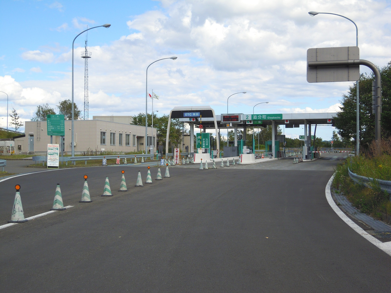 北海道勇払郡安平町にある道東自動車道の追分町インターチェンジ料金所を一般道側から。